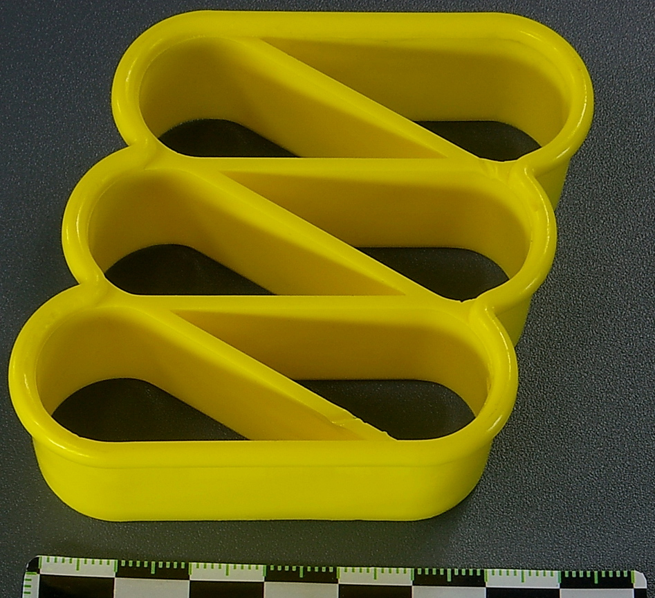 Förmchen aus Kunststoff zum Ausstechen von Mutzen/Mutzemandeln